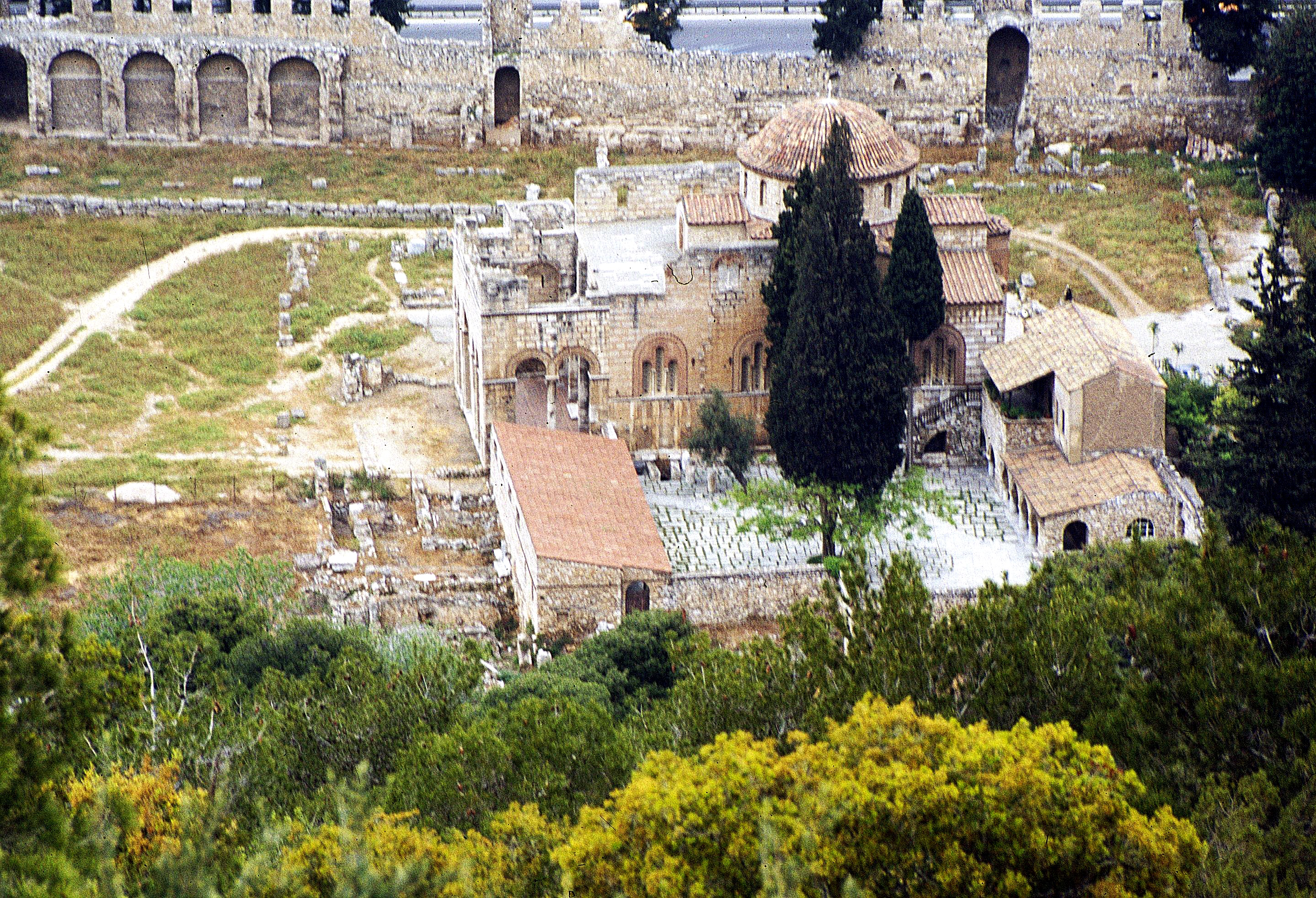 Athen: Kloster Daphne